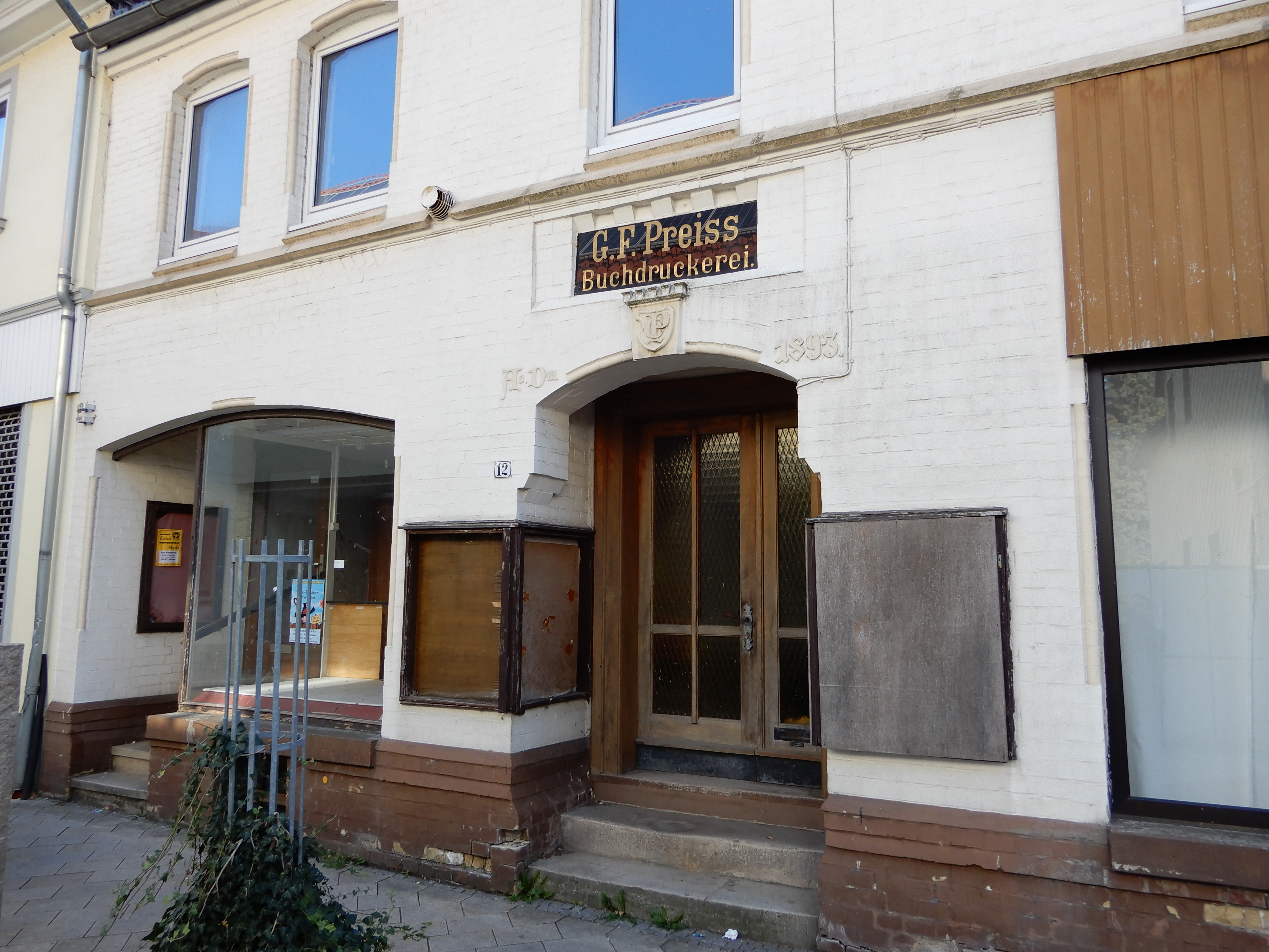 Haus Hauptstraße 12 (Herzberg am Harz)